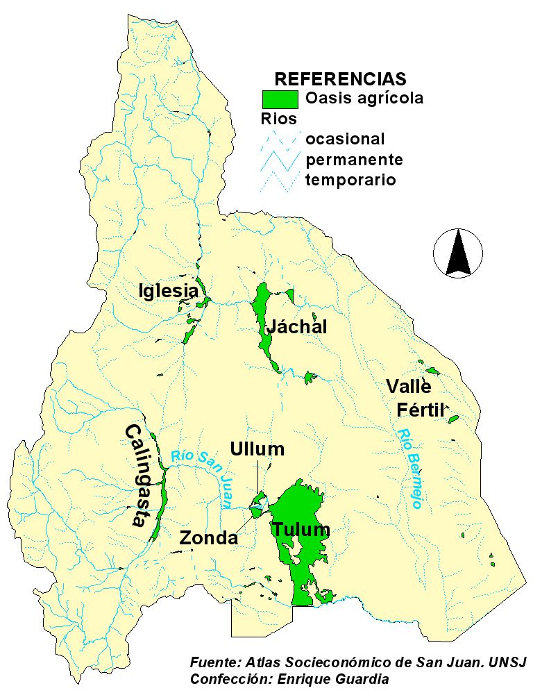 Mapa que representa la distribución de los oasis agrícolas de la provincia de San Juan, Argentina